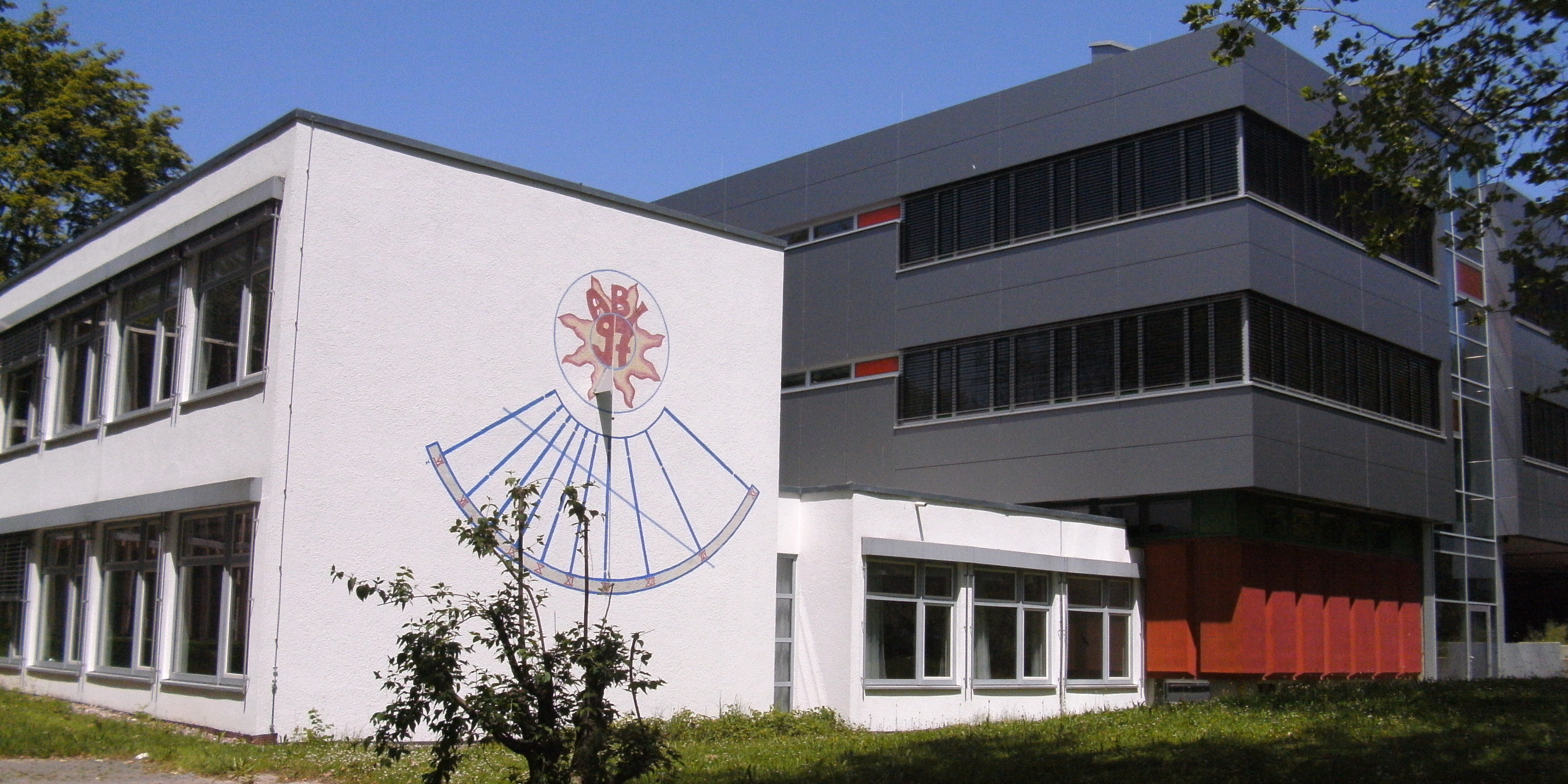 B-Bau des Rupert-Neß-Gymnasiums in Wangen im Allgäu